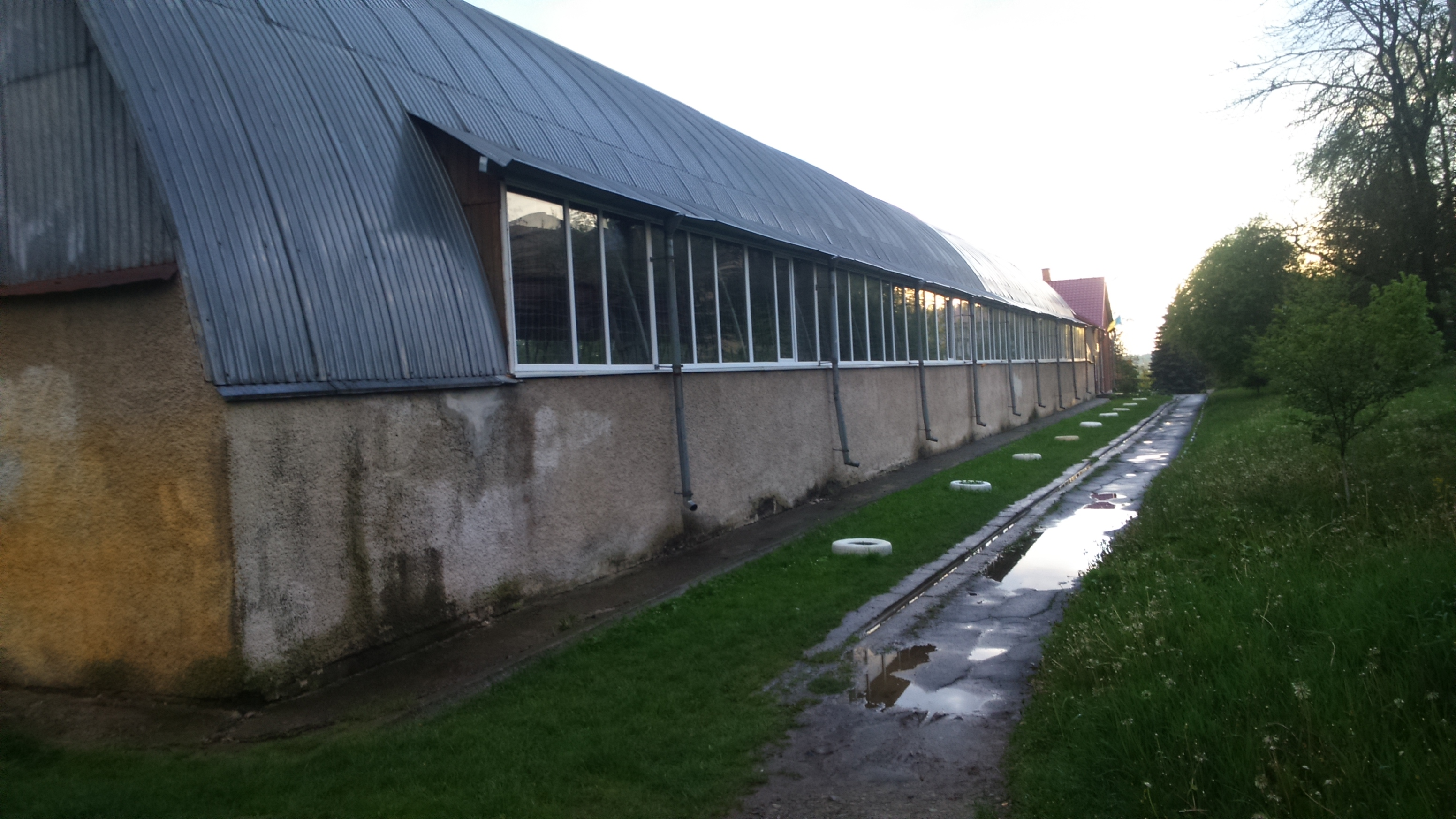 Дитячо-юнацька спортивна школа